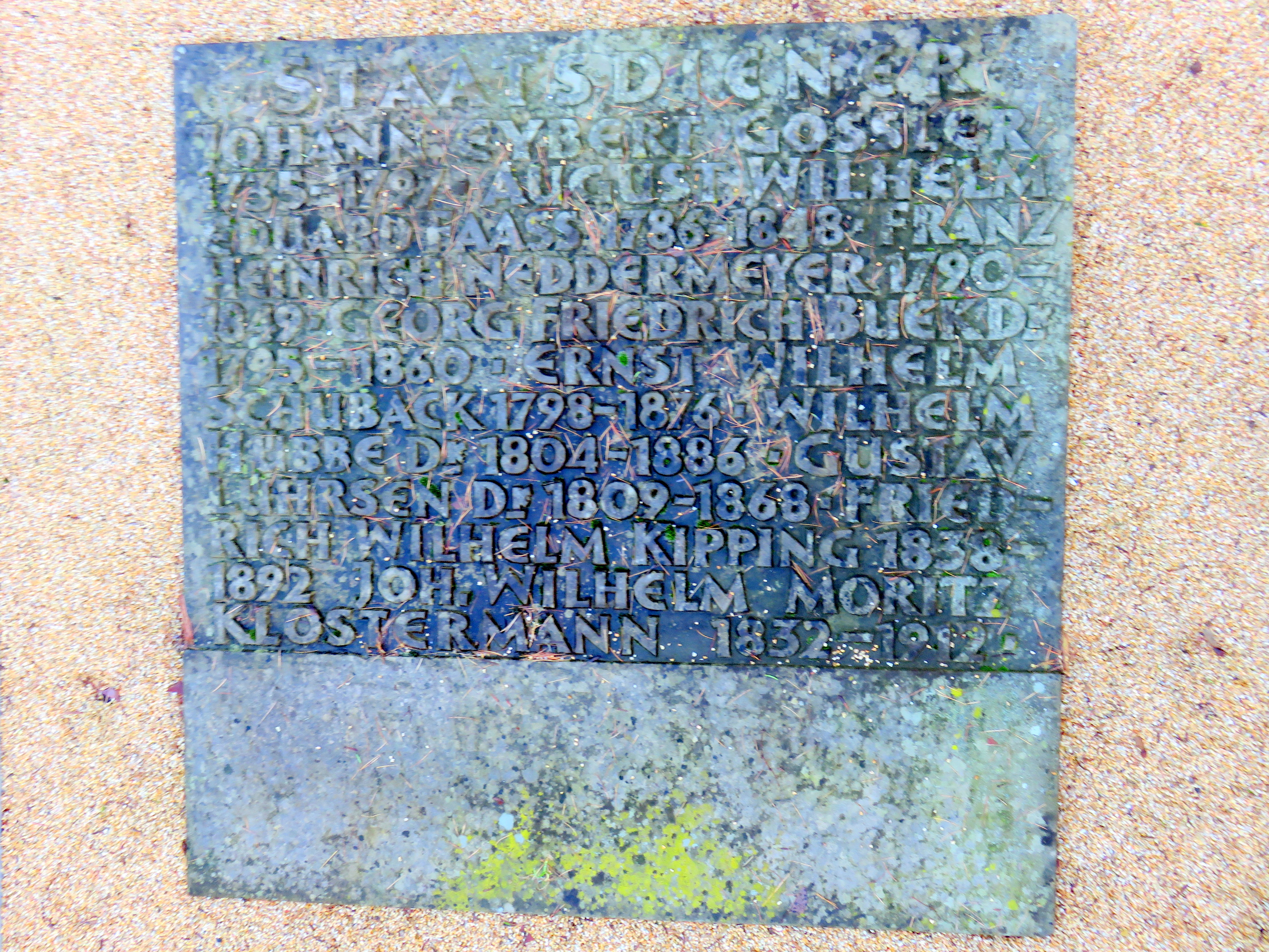 Sammelgrabmal Staatsdiener im Bereich des Althamburgischen Gedächtnisfriedhofs auf dem Hamburger Friedhof Ohlsdorf zu Ehren von unter anderen Gustav Lührsen (Jurist), Friedrich Wilhelm Kipping (Branddirektor).